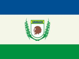 Bandeira de Sirinhaém